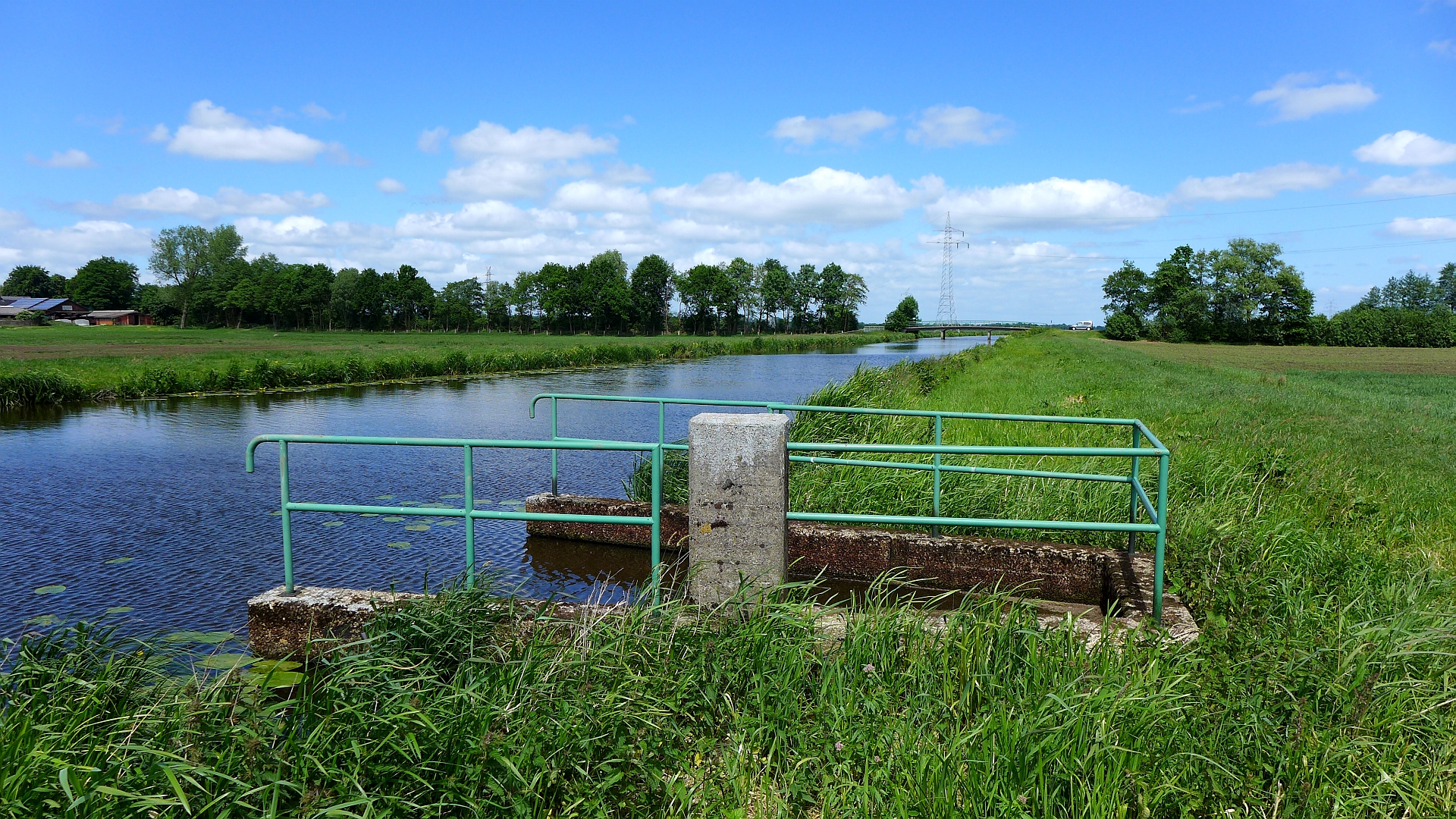 Fluß Mehe mit einem Siel zur Entwässerung der Weiden am Dorfrand von Abbenseth, Samtgemeinde Börde Lamstedt. Bei Brobergen mündet die Mehe in den Fluß Oste. Aufnahmedatum 2015-06.